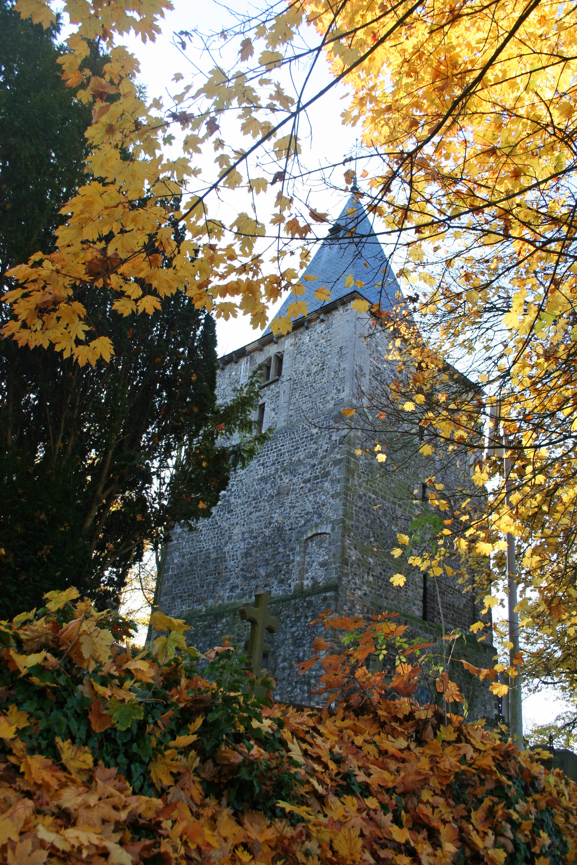 La tour de l'ancienne église Saint Victor. Site classé.